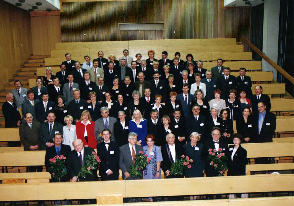 grupowe zdjecie ludzi wydzialu